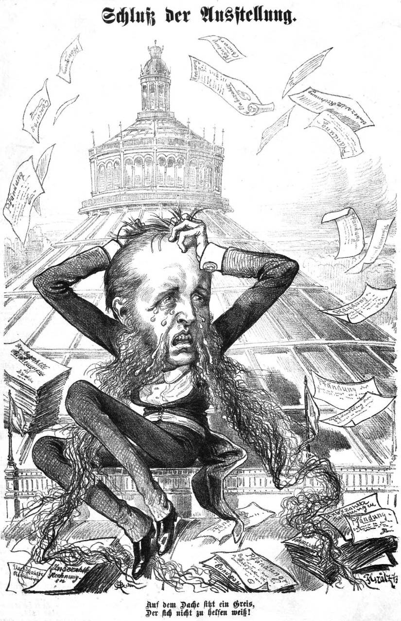 Karikatur des Leiters der Wiener Weltausstellung 1873 Wilhelm Schwarz-Senborn